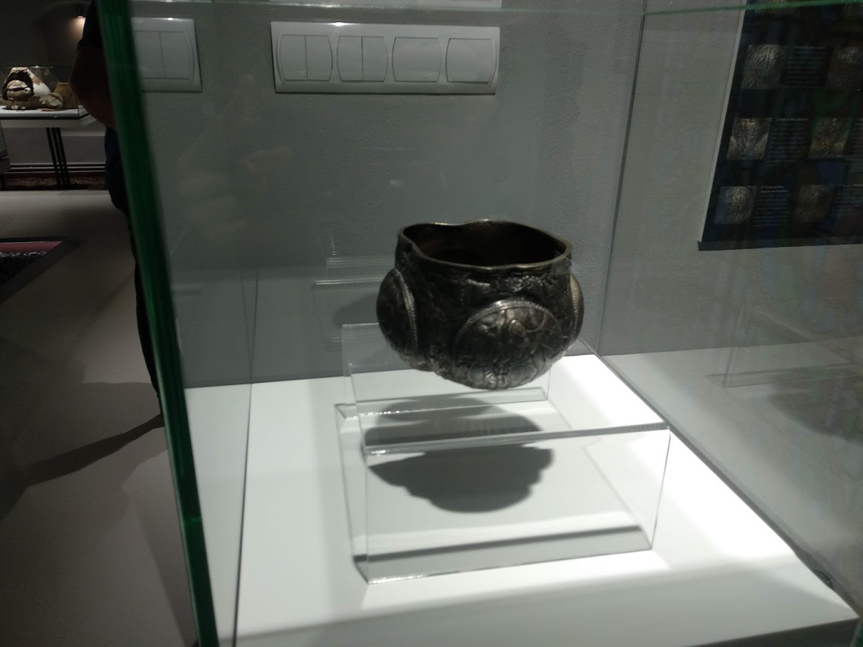 Kopia Czary Włocławskiej